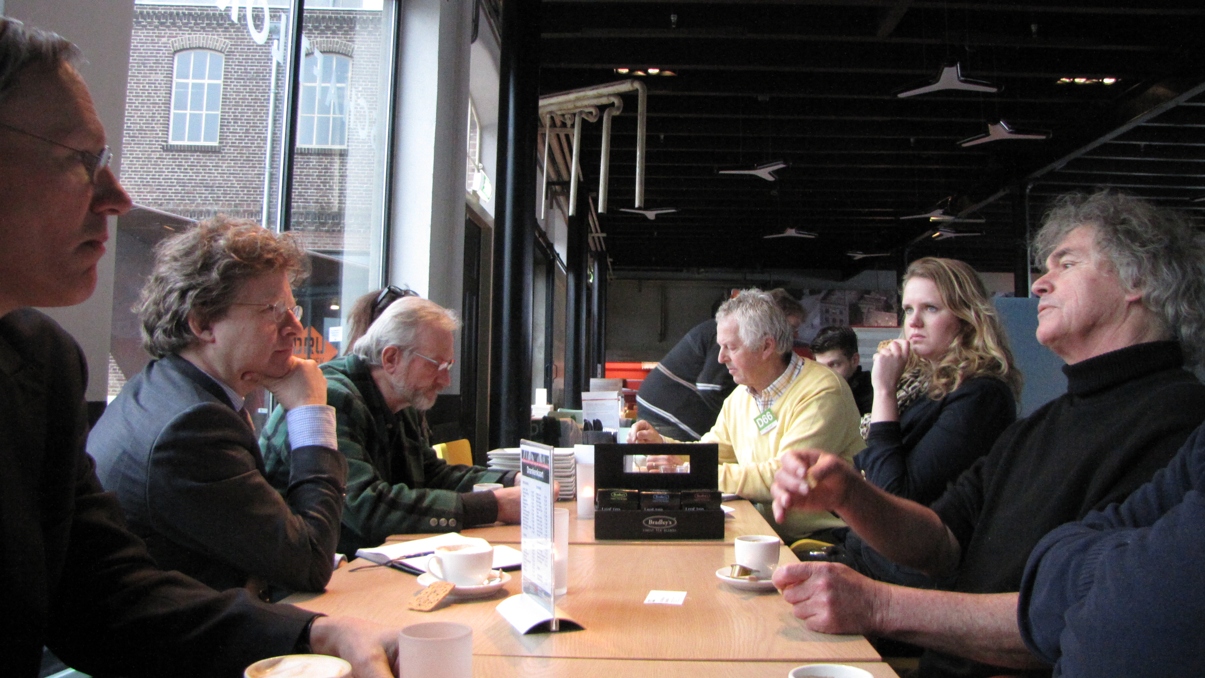 Michiel Scheffer (D66, links) en Hans Keuper (Boh Foi Toch) in de DRU-Cultuurfabriek te Ulft.